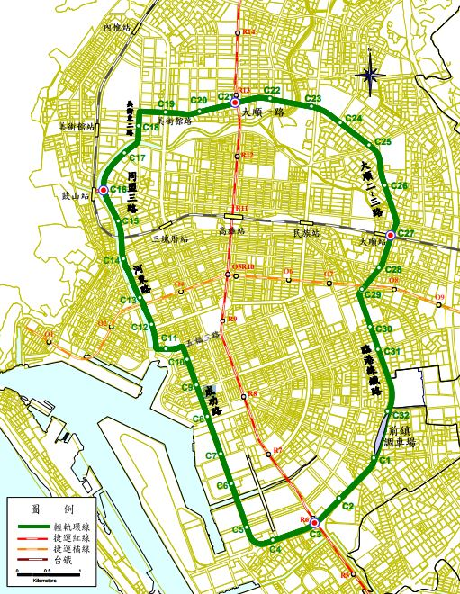 高雄環狀輕軌捷運系統路線方案示意圖，由高雄市政府捷運工程局繪製